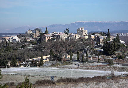 Village de Montmeyan